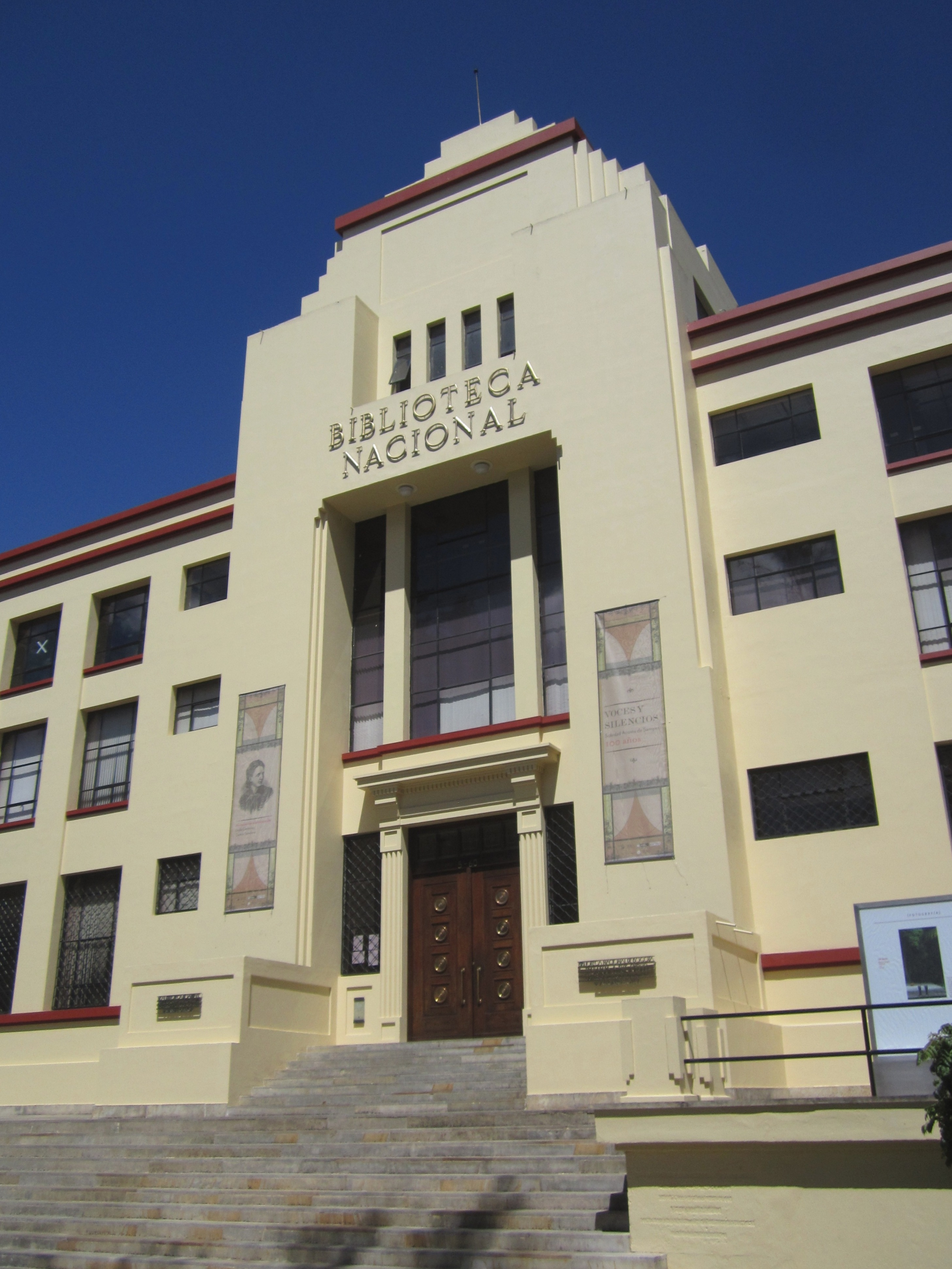 Bogotá